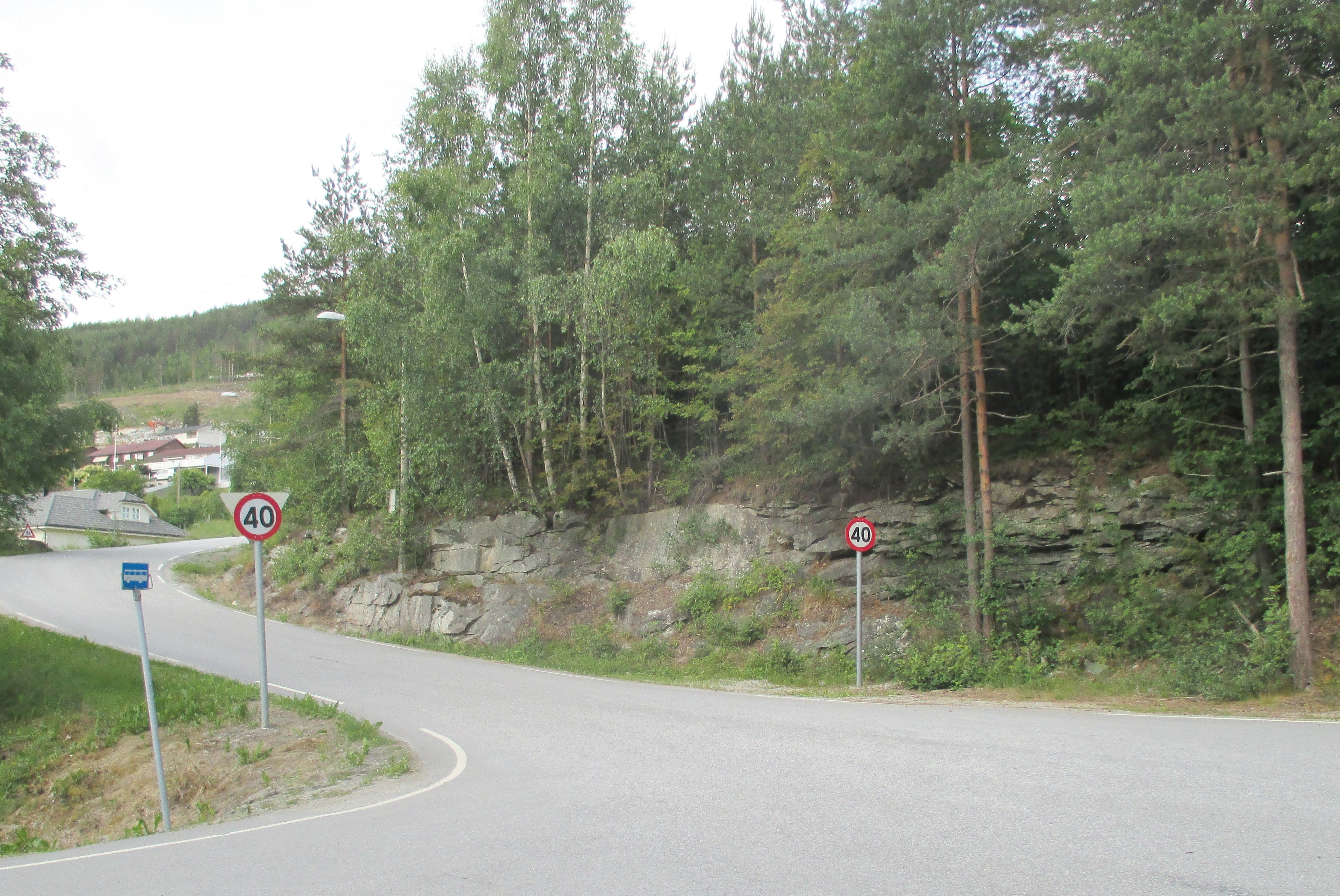 Østenden av Haukåsvegen (fylkesvei 213) ved Kaupangsvegen (arm av riksvei 5)